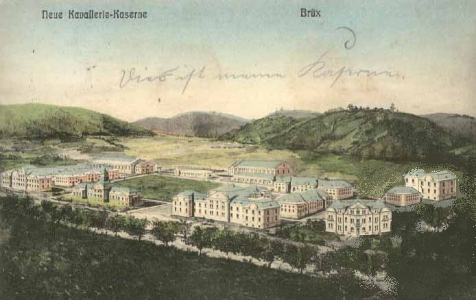 Neue Kavallerie-Kaserne in Brüx (Böhmen)